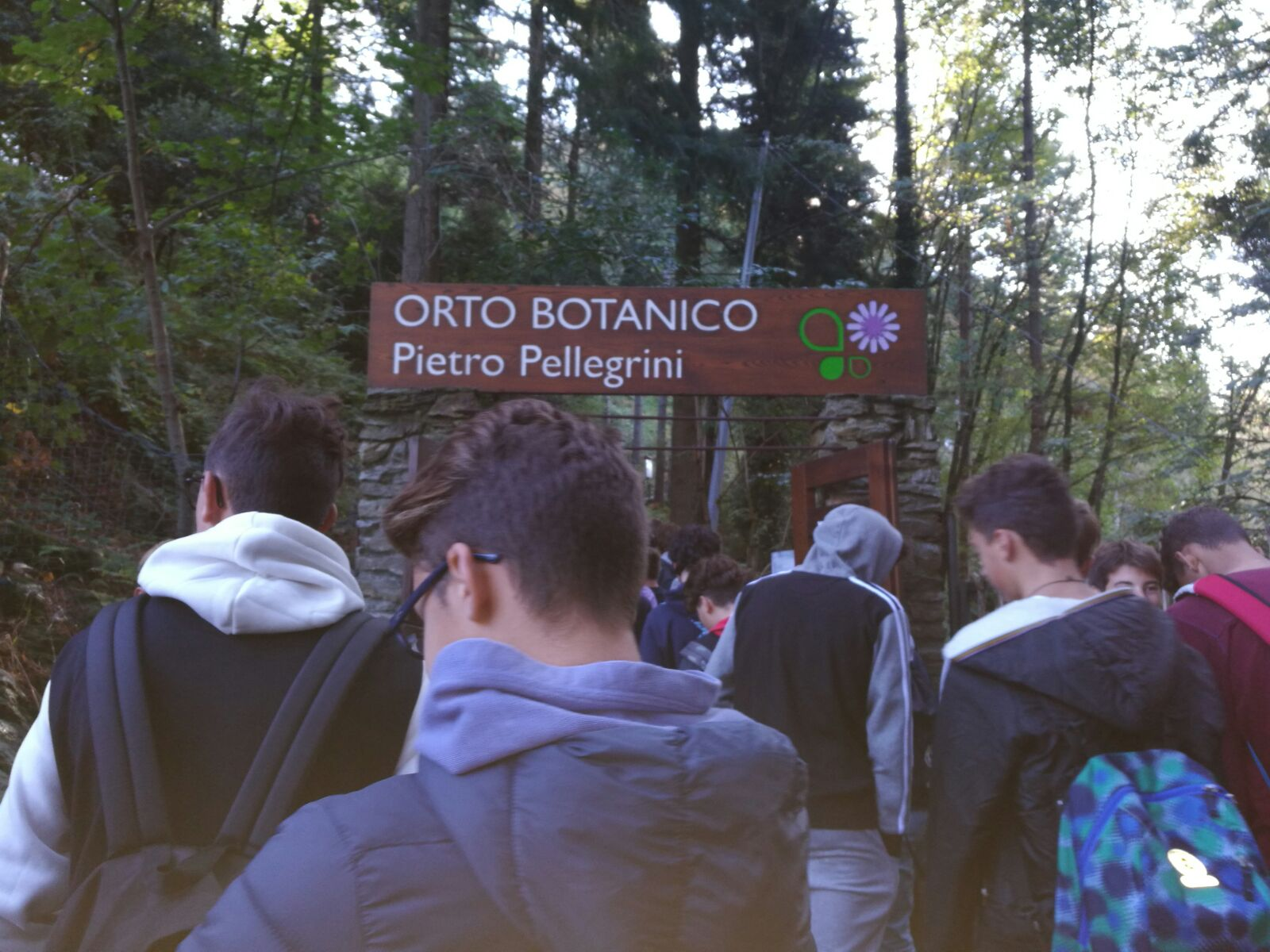 Entrata dell'Orto Botanico Pellegrini-Ansaldi